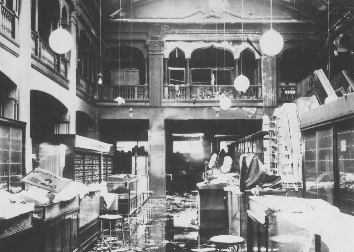 Branden i varuhuset Meeths 1937